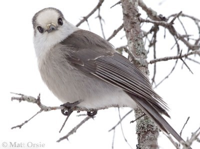 Gray Jay